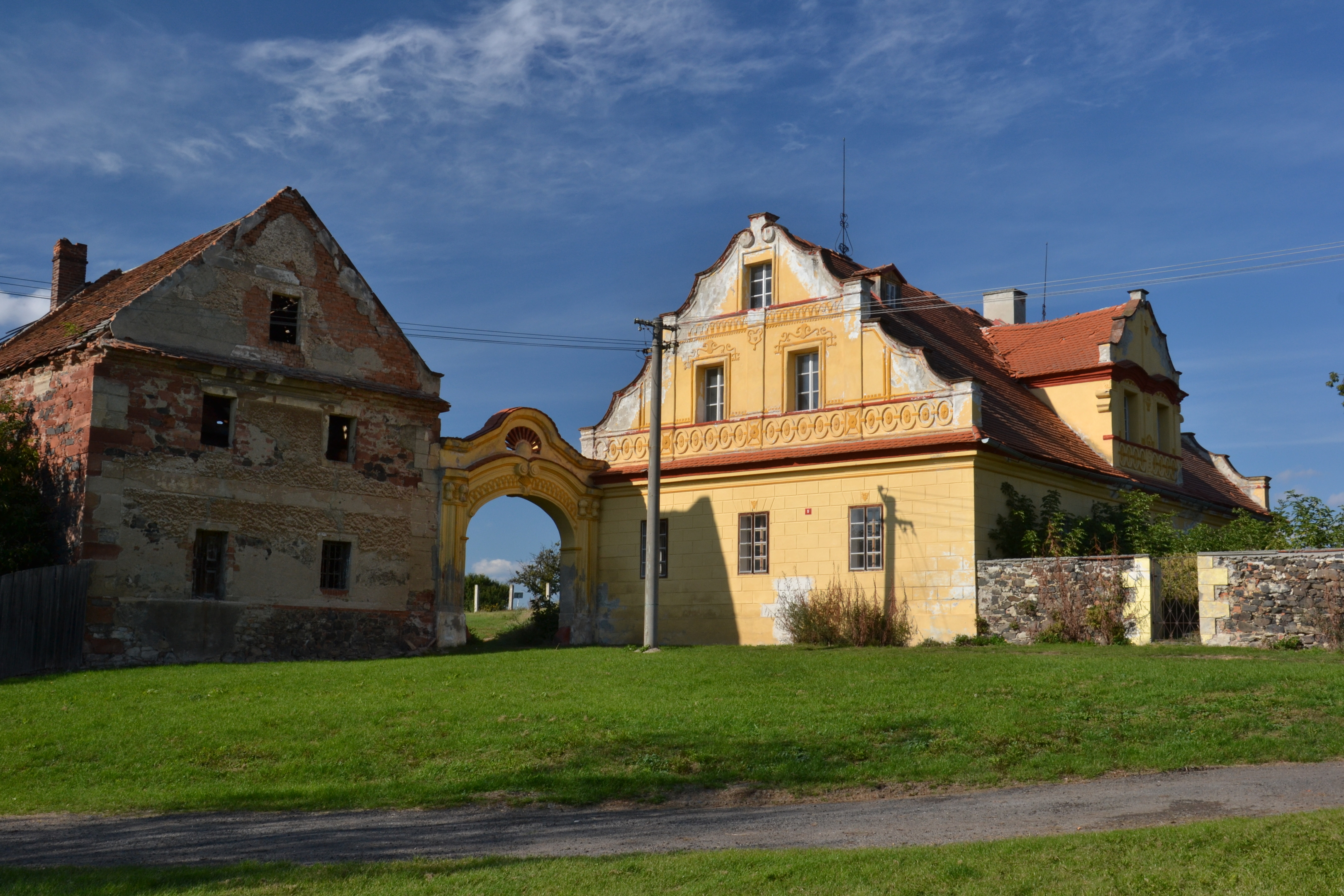 Měšťanský dům (Nové Třebčice), Nové Třebčice 9